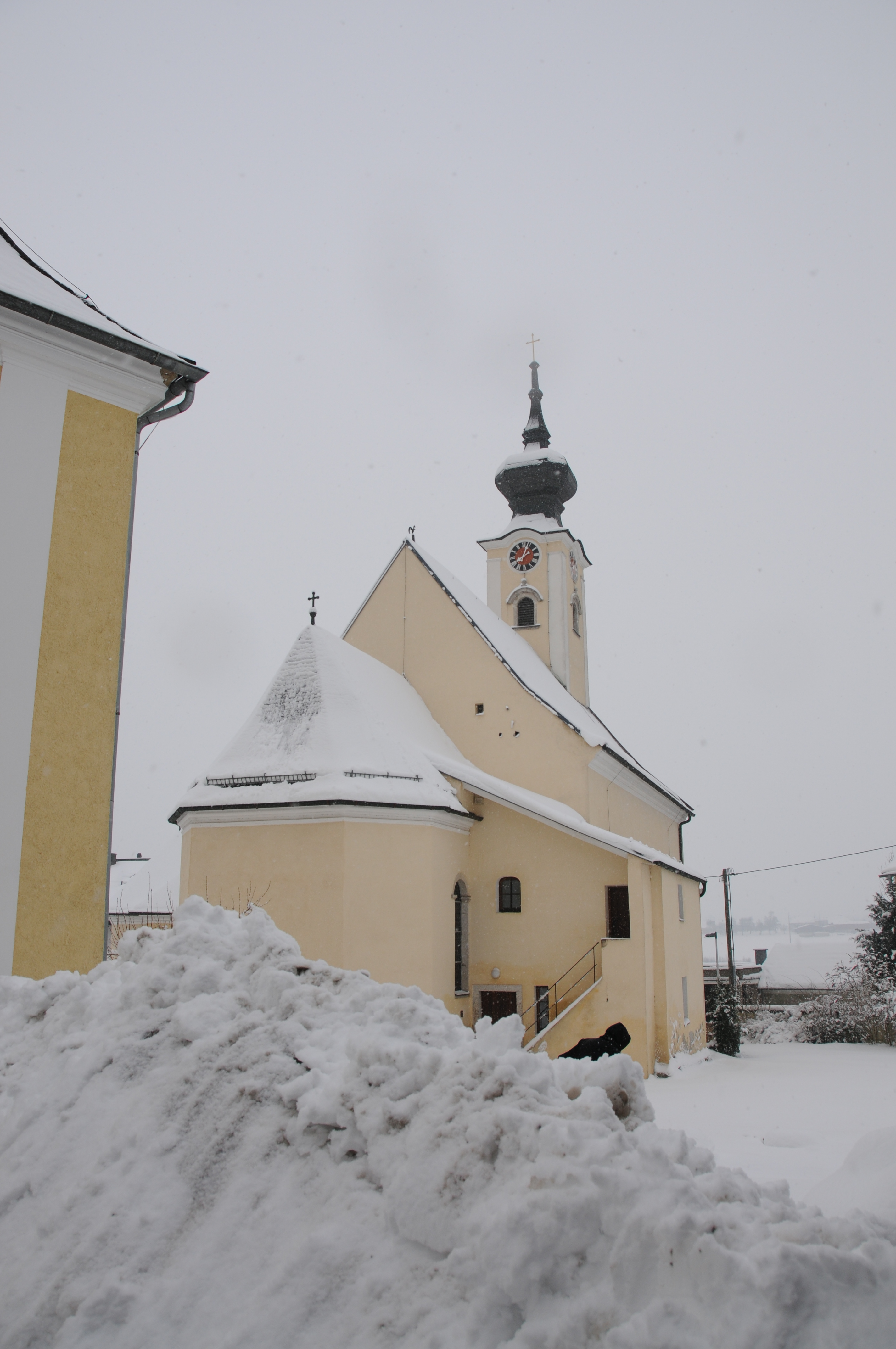 Kath. Pfarrkirche Alle hll. Apostel und ehem. Friedhof